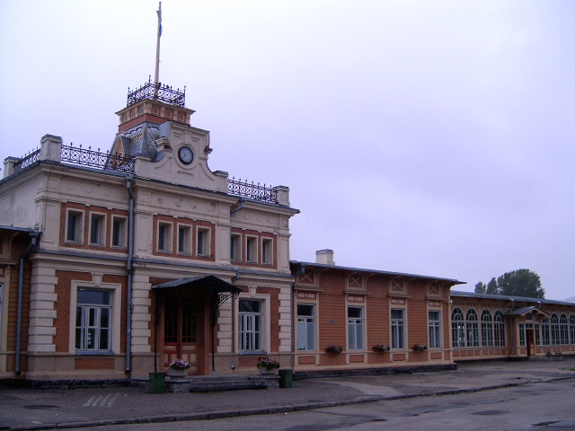 Staion van Haapsalu